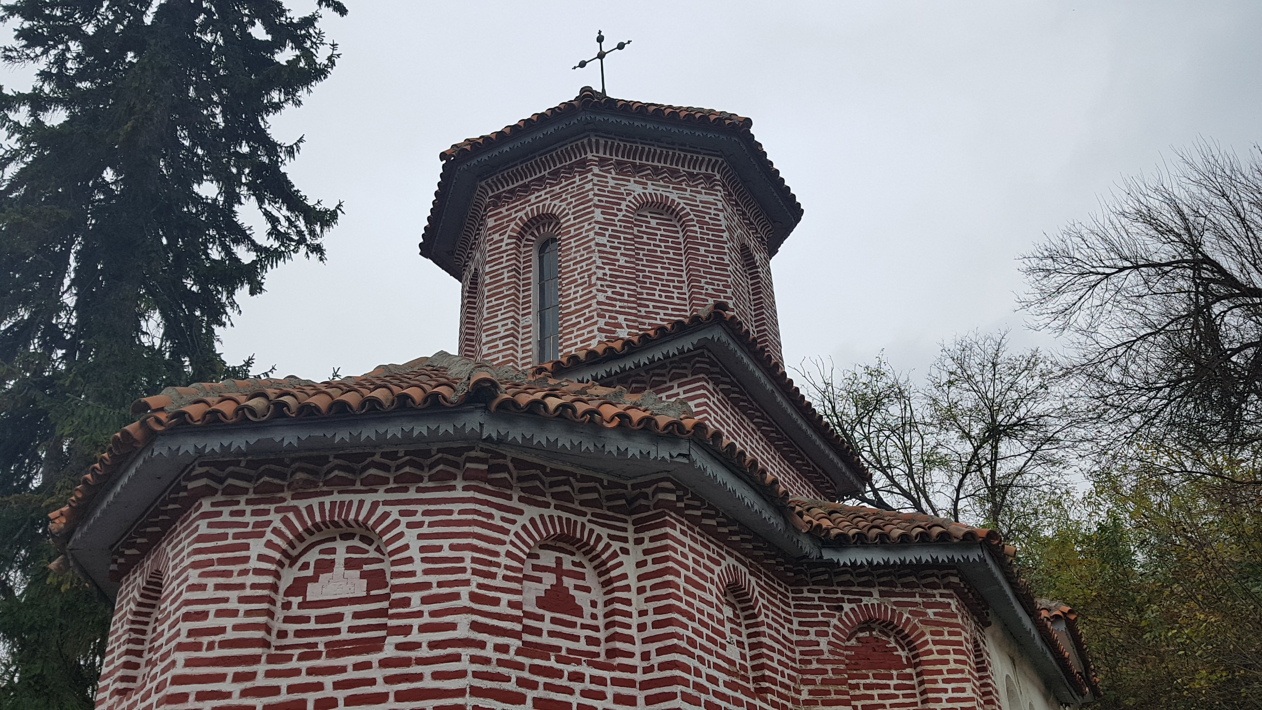 Biserica „Adormirea Maicii Domnului” a fostei mănăstiri Stănești